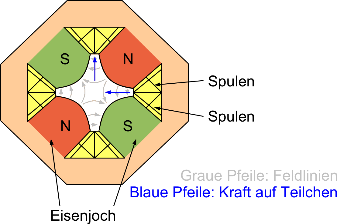 Sketch of a quadrupole magnet, German captions, based upon Image:Quadrupole_de.svg